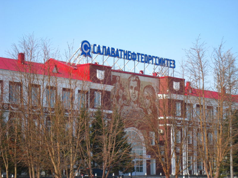 Здание Салаватнефтеоргсинтез в городе Салават, Башкортостан